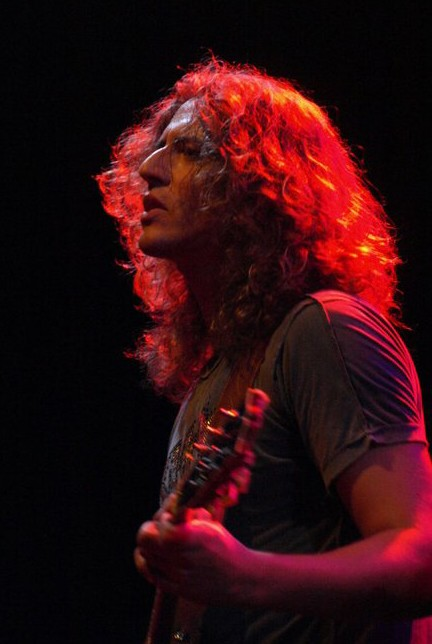 Steph Honde live en 2010